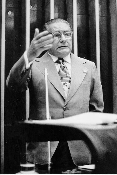 Aloysio Chaves (Viseu, Pará em 25 de novembro de 1920). Exerceu o mandato de senador de 1979 a 1987.Foto: Célio Azevedo/Agência Senado